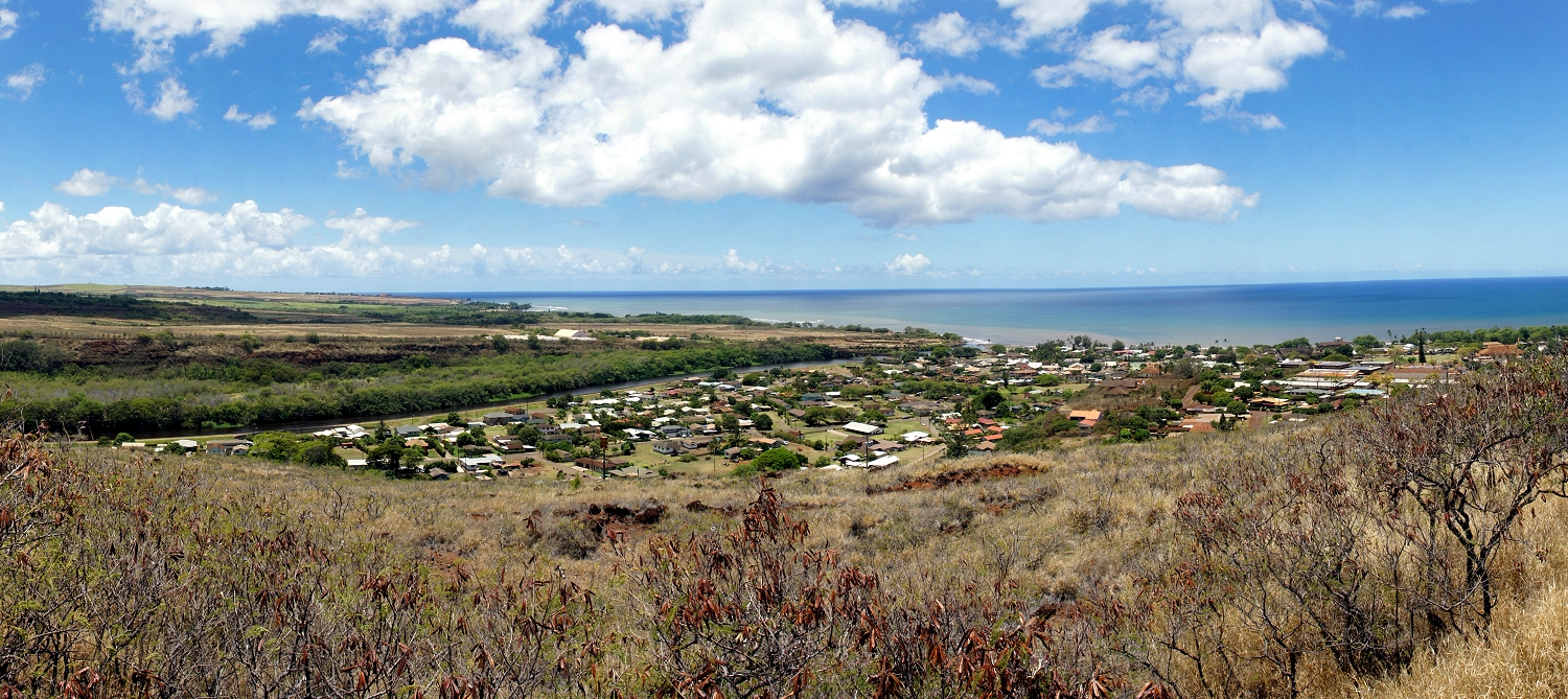 Иллюстрация для викиучебника Гавайеведение